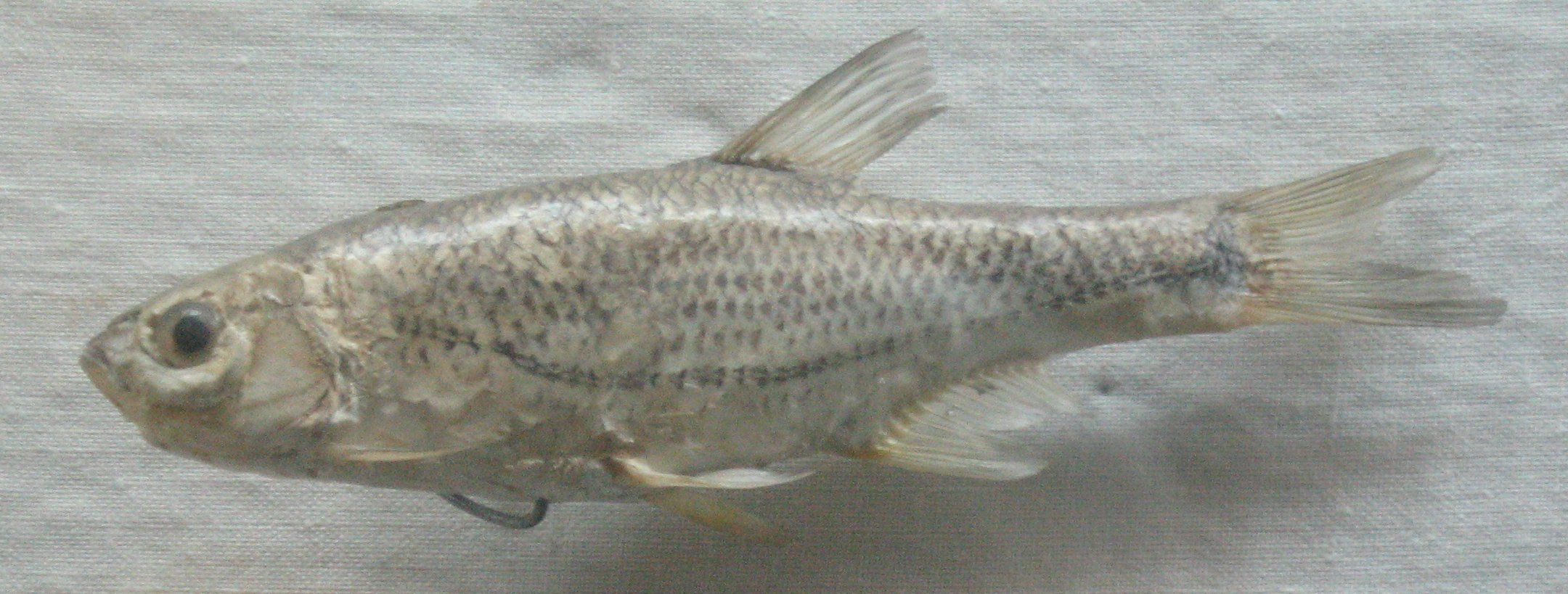 Риба Гомнушка, го населува долниот тек на реката Треска.